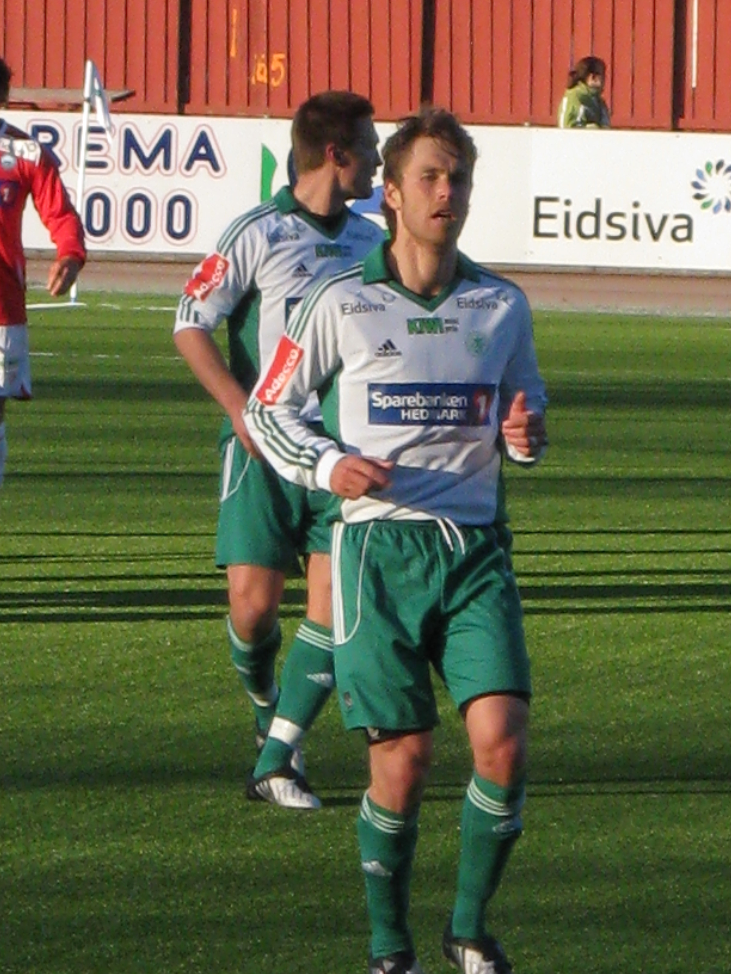 Håkan Malmström (H-K) under en kamp mellom Kongsvinger og Hamarkameratene.